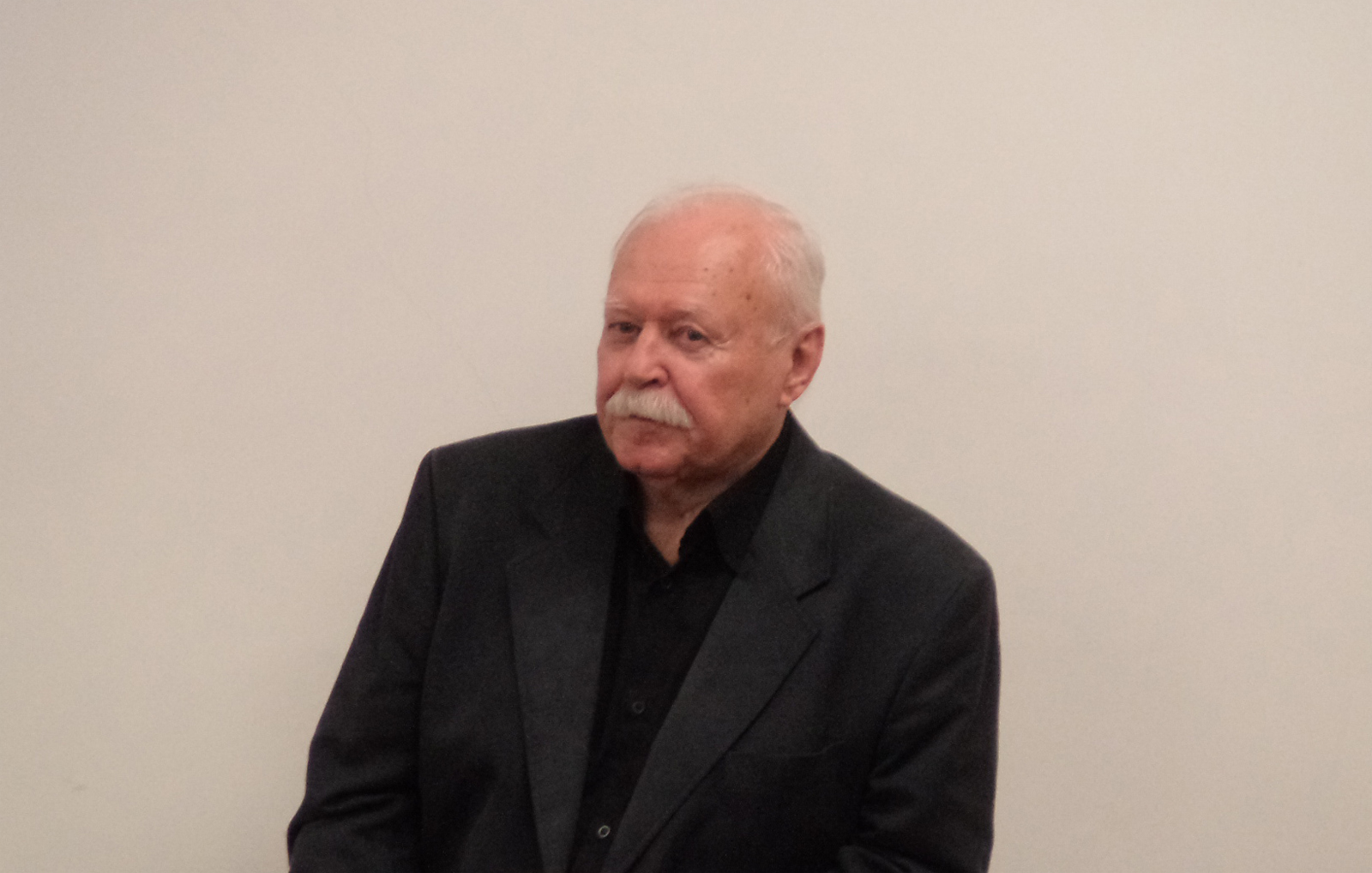 Mácza Mihály Komáromban